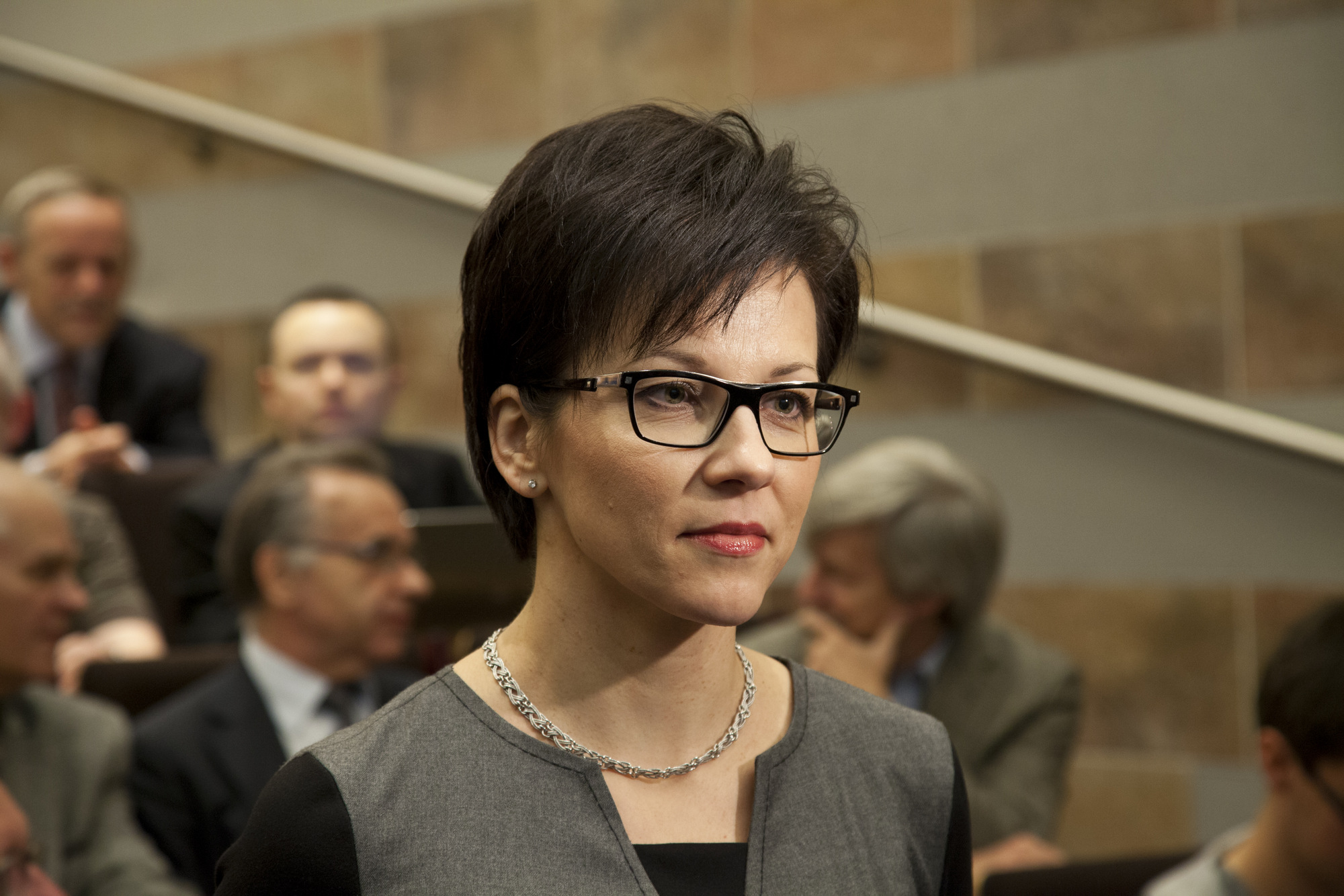 Prof. Małgorzata Zaleska. „Polska w drodze do euro” – debata Narodowego Banku Polskiego w Szkole Głównej Handlowej.